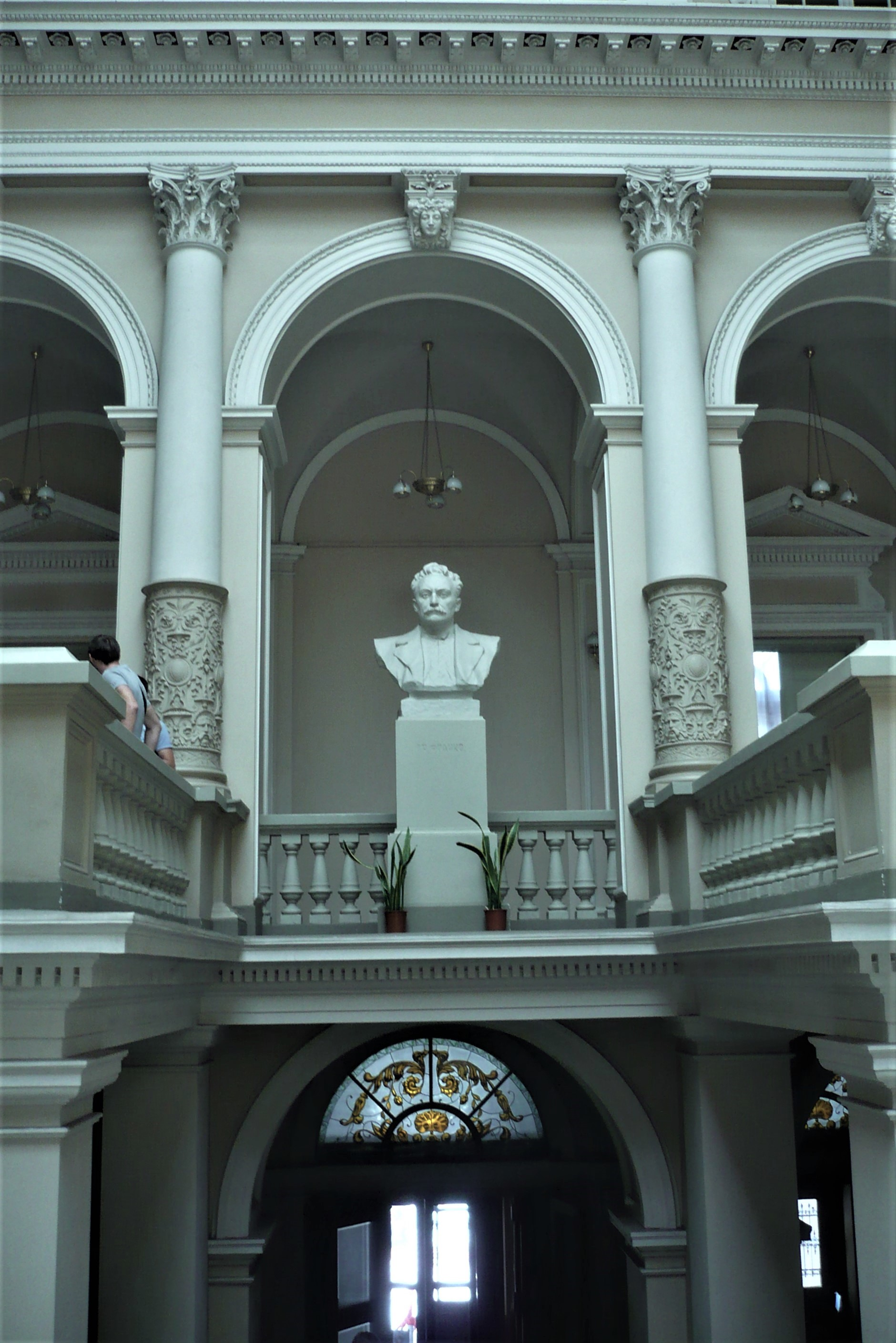 Lwowski Uniwersytet Narodowy im. Iwana Franki. Hol